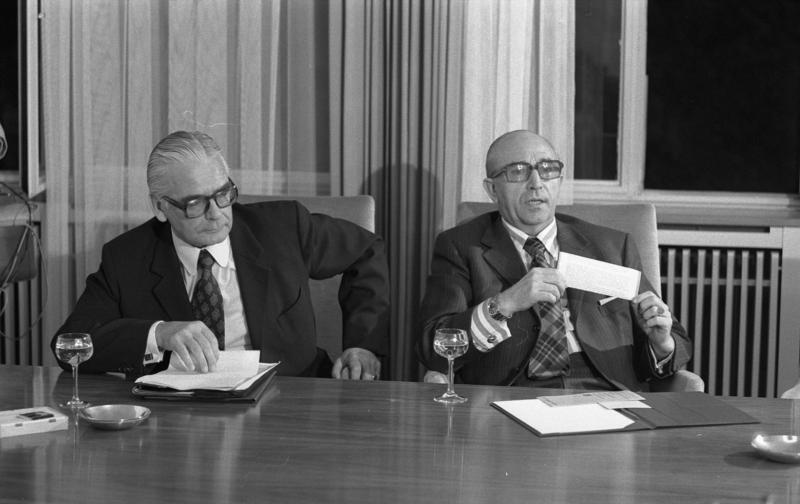 Sitzung der Bevollmächtigten der Länder beim Bund im Bundestag